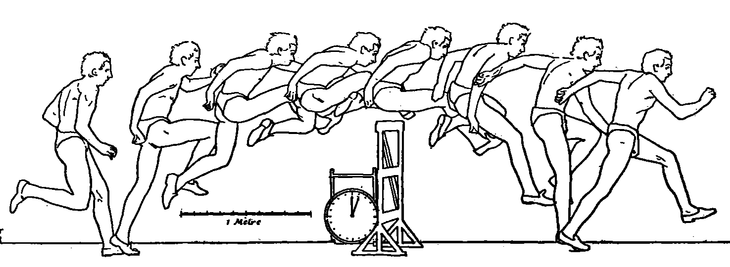 Épure de l'Américain Kraenzlein franchissant la haie